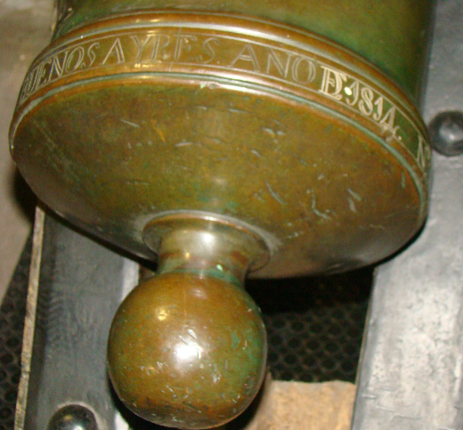 Cañon N°4 1814, detalle (Museo de Armas de la Nación)